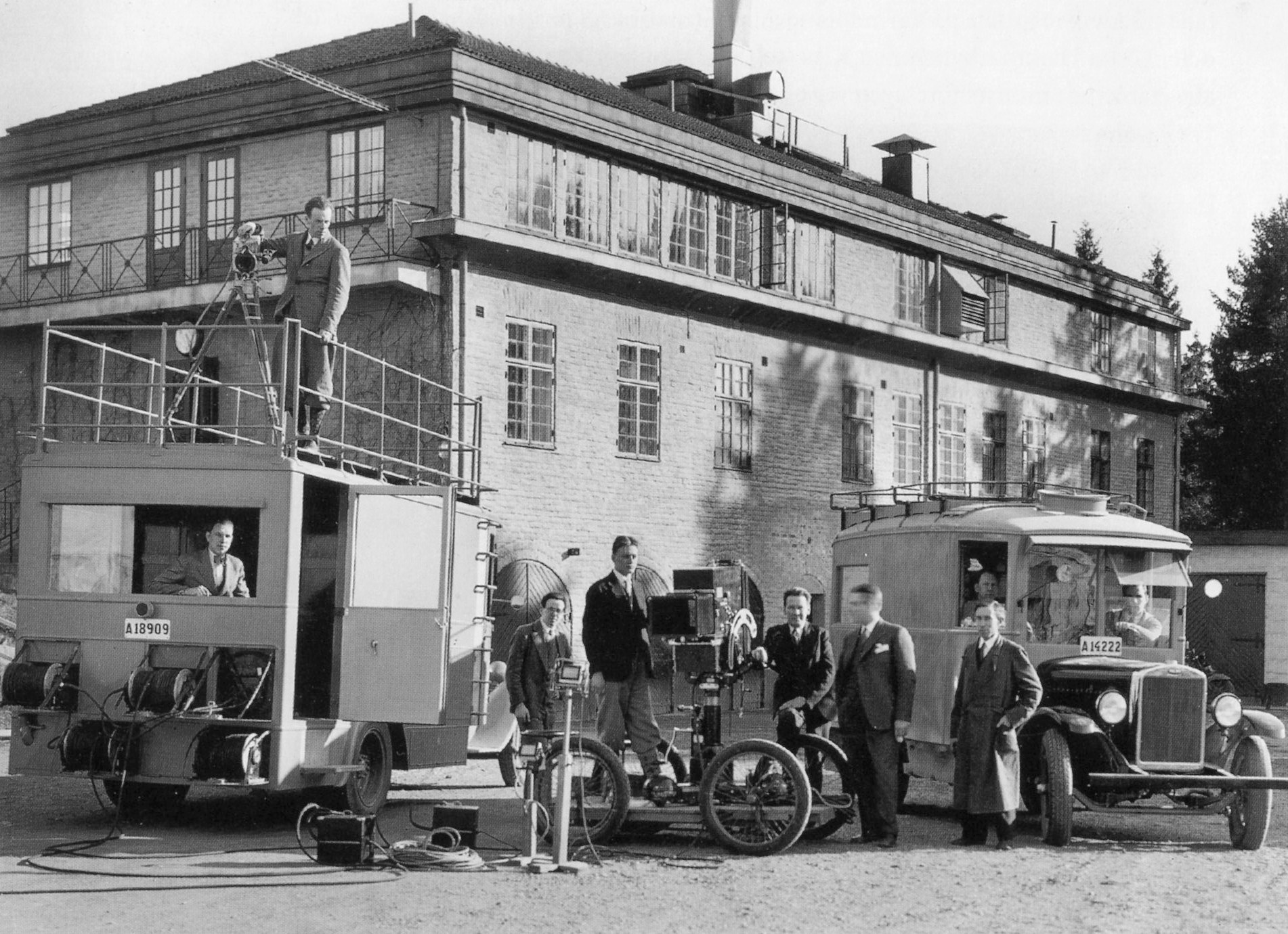 En exteriörinspelning förberedds på Filmstadens område